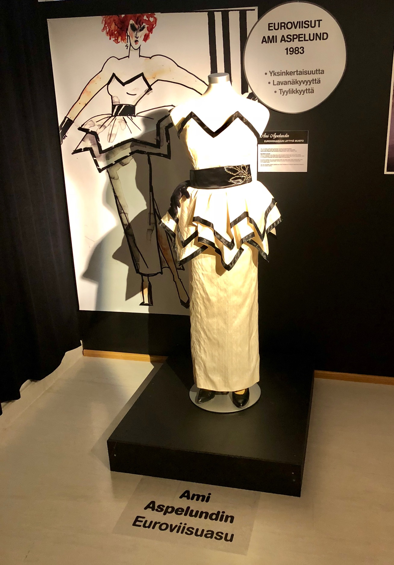 Villiä viihdettä ja kasarimeininkiä- näyttely